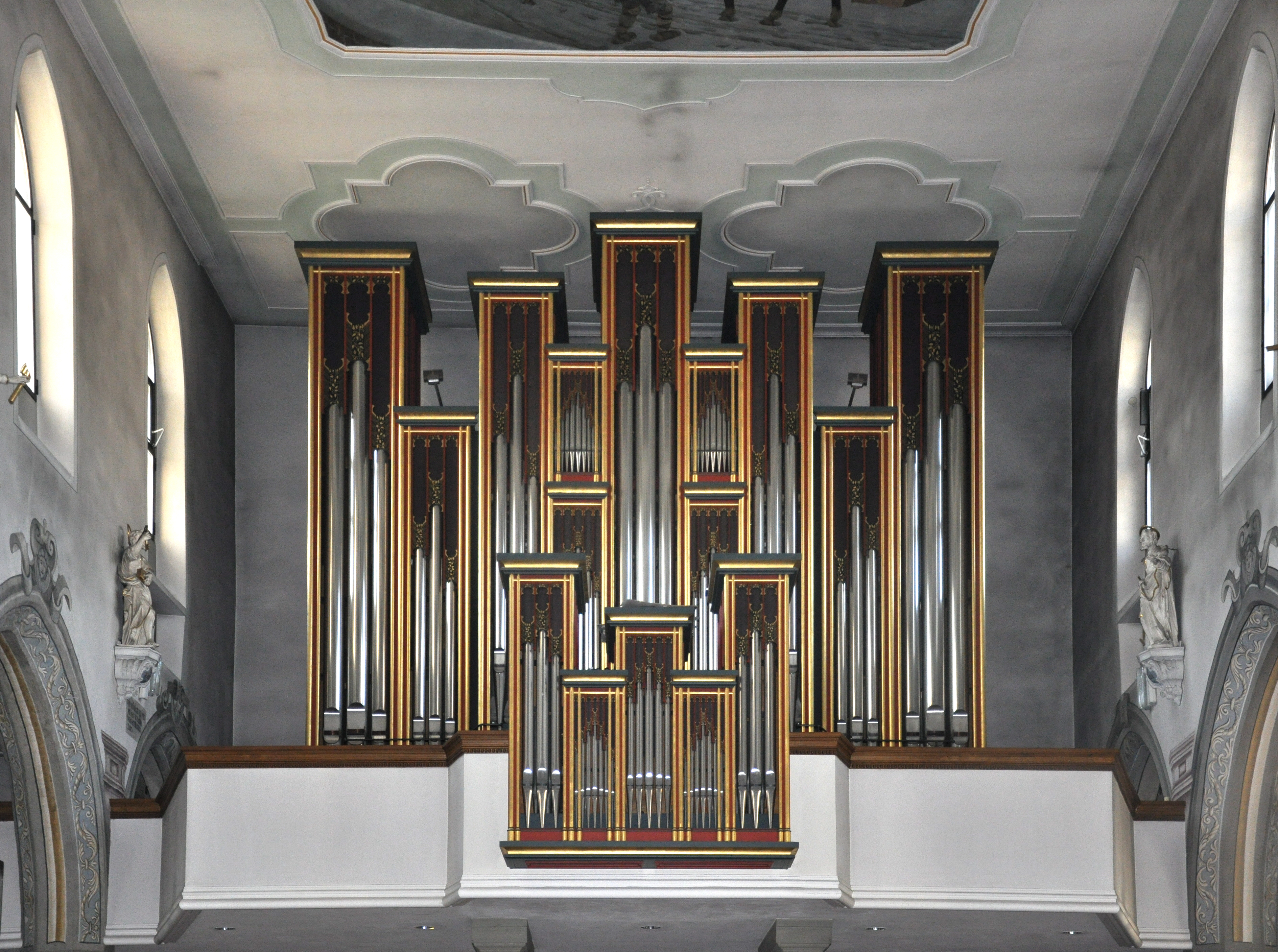 Kath. Stadtpfarrkirche St. Martinus, Wangen im Allgäu Blick zur Rieger-Orgel von 1987